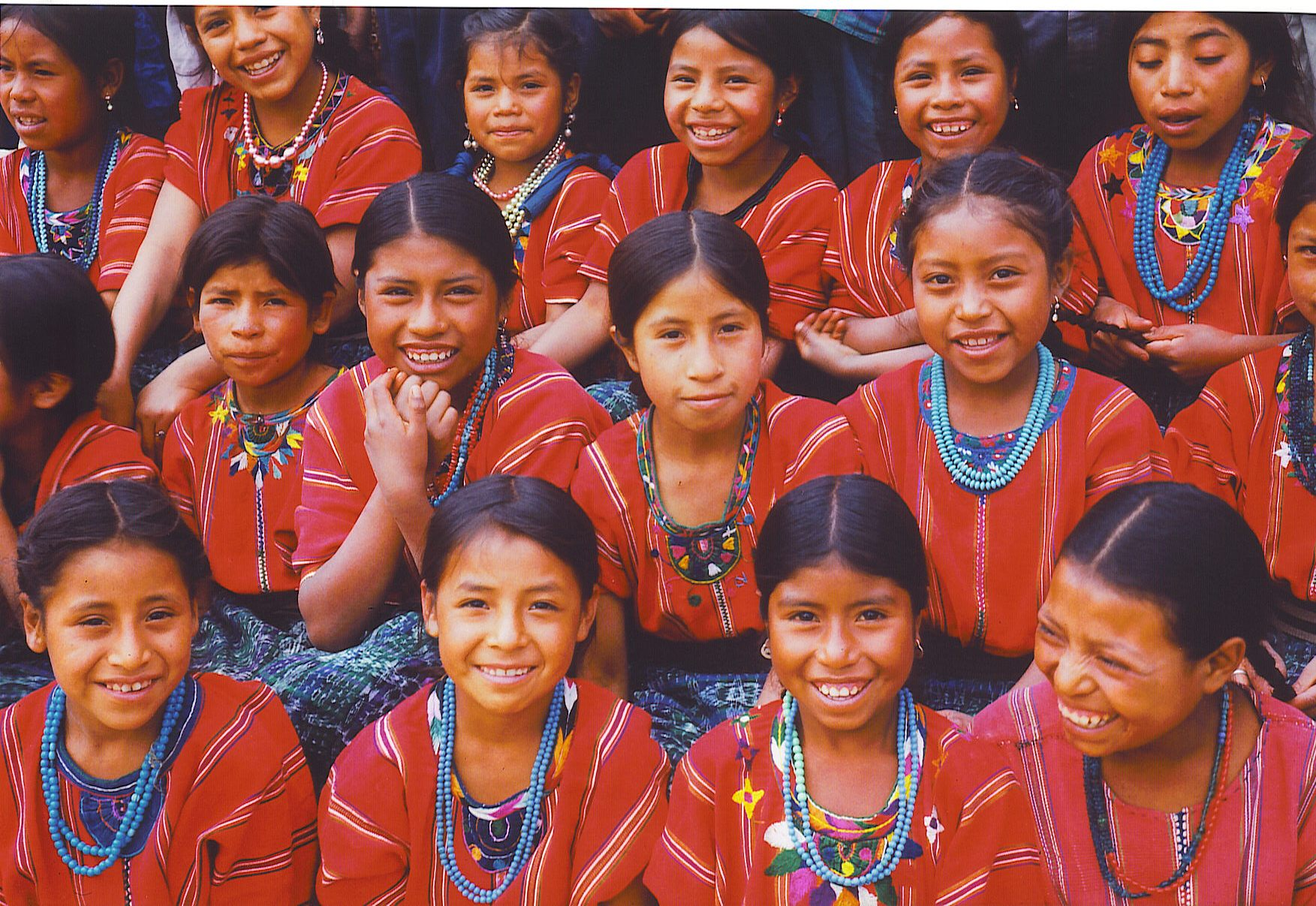 foto de niñas en 1963